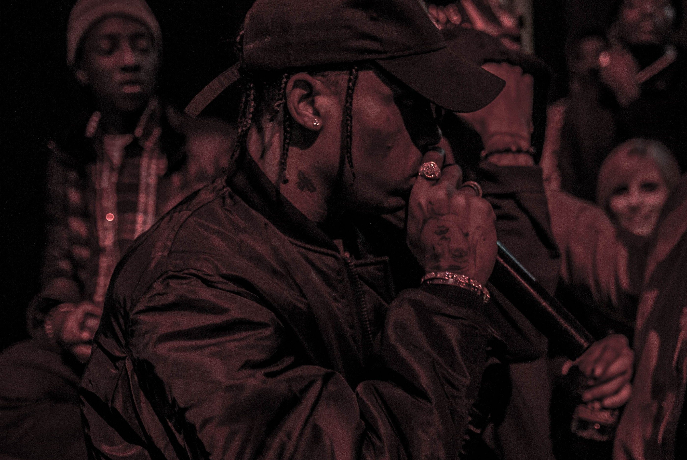 Рэпер Travis Scott, 2016